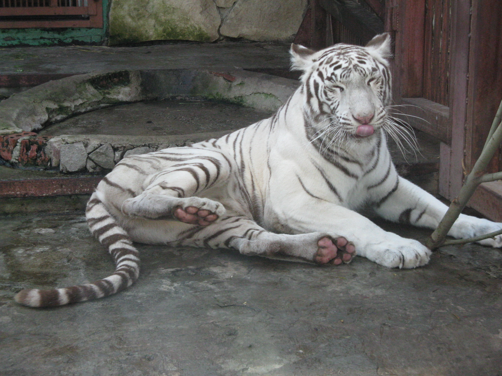 Белый тигр. Екатеринбургский зоопарк